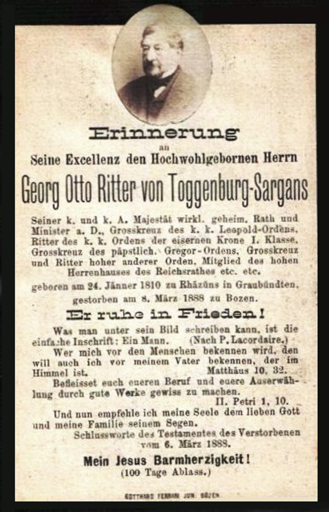 Sterbebild Sr. Excellenz des Herrn Georg Ritters von Toggenburg in Bozen, vormaliger Statthalter von Tirol (24. Januar 1810 in Rhäzüns, Kanton Graubünden; † 8. März 1888 in Bozen), am 10. März 1888 bestattet zu Bozen (Report darüber in den „Innsbrucker Nachrichten“ d.d. 15. März 1888)